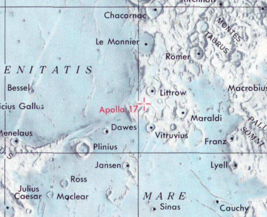 Localización del lugar de aterrizaje del Apolo 17. (Lunar Chart LPC1. Second Edition)